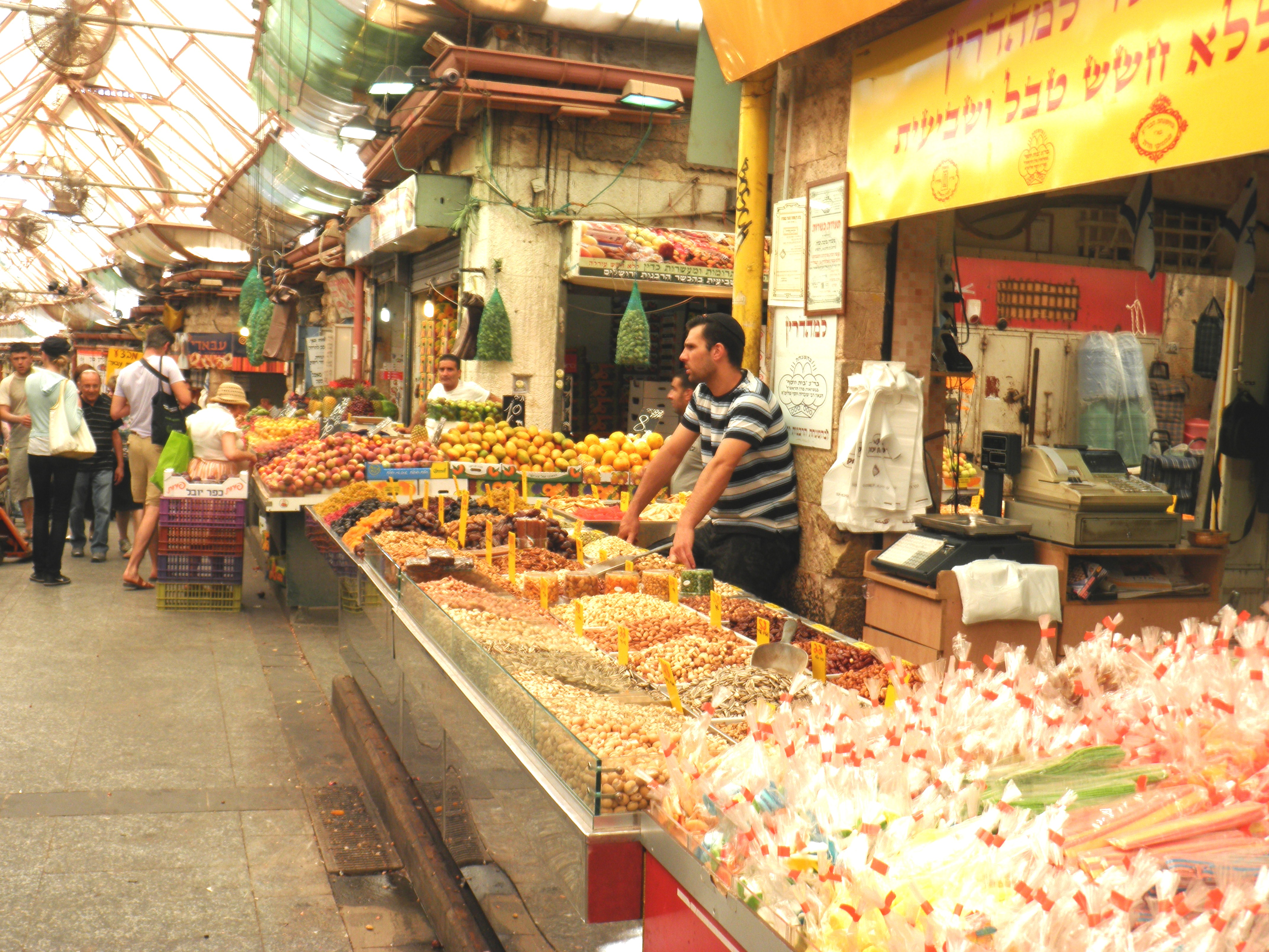 שוק מחנה יהודה